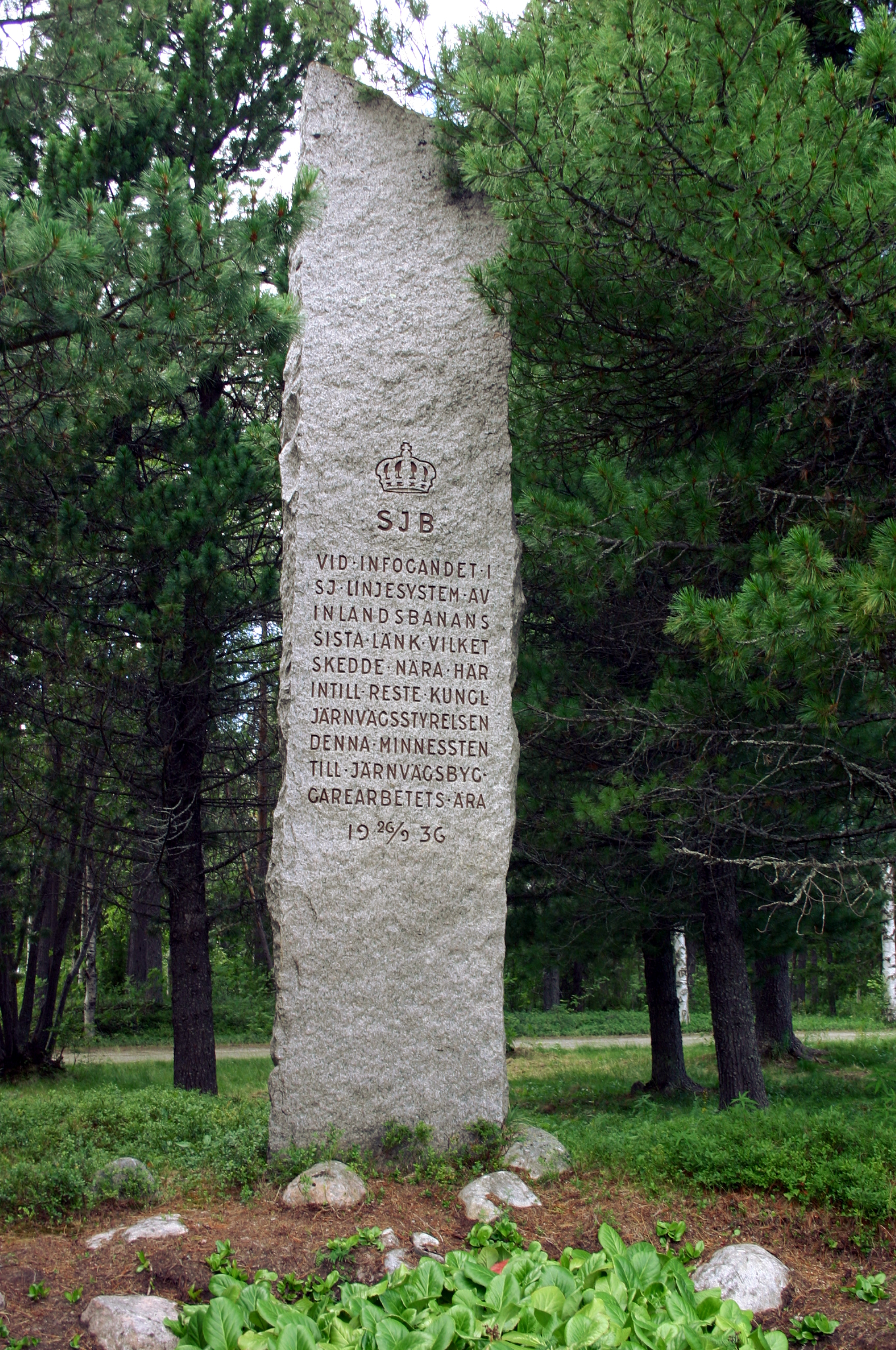 Gedenkstein in Kabdalis 11.08.04